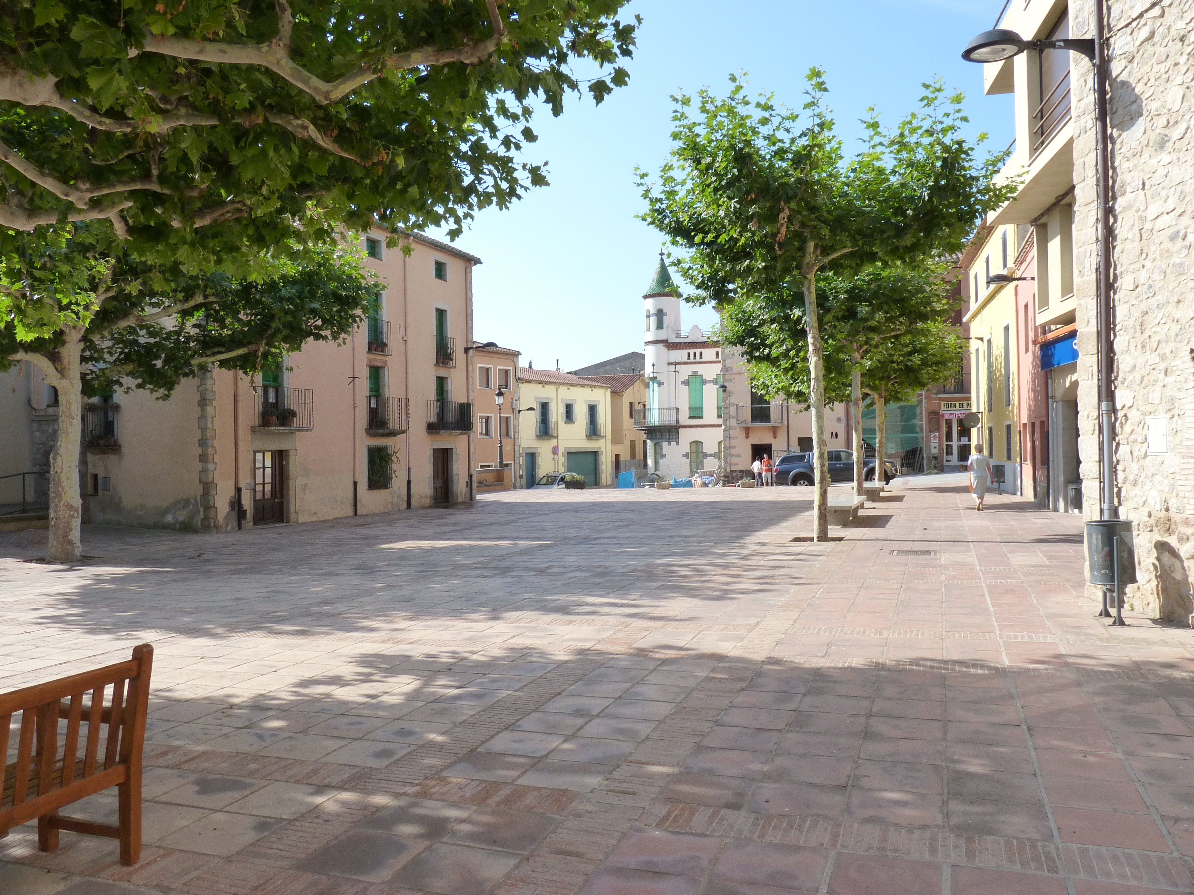 Grande Place, Agullana (Haut-Ampurdan, Gérone, Catalogne, Espagne)